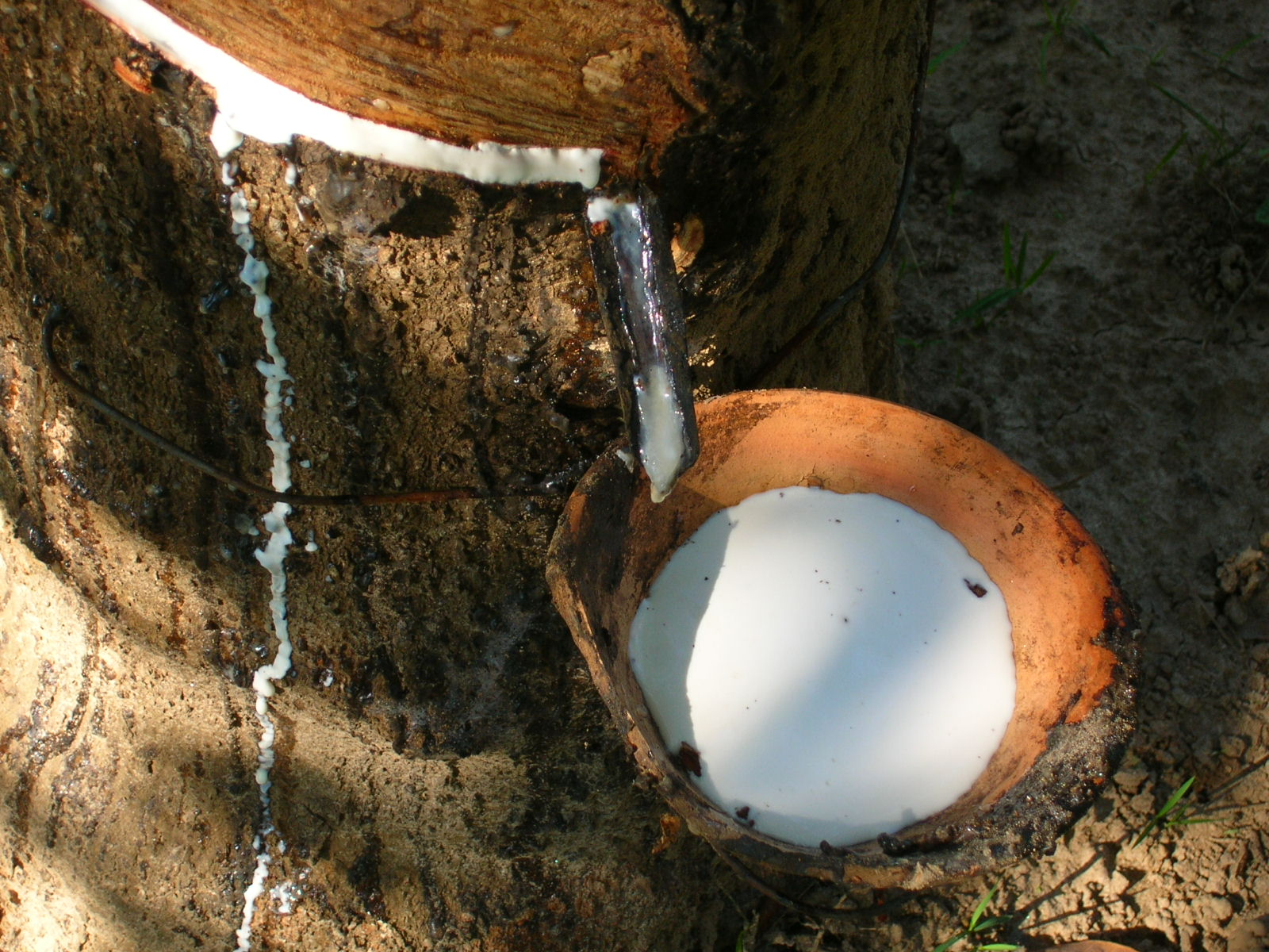 rubber tree up